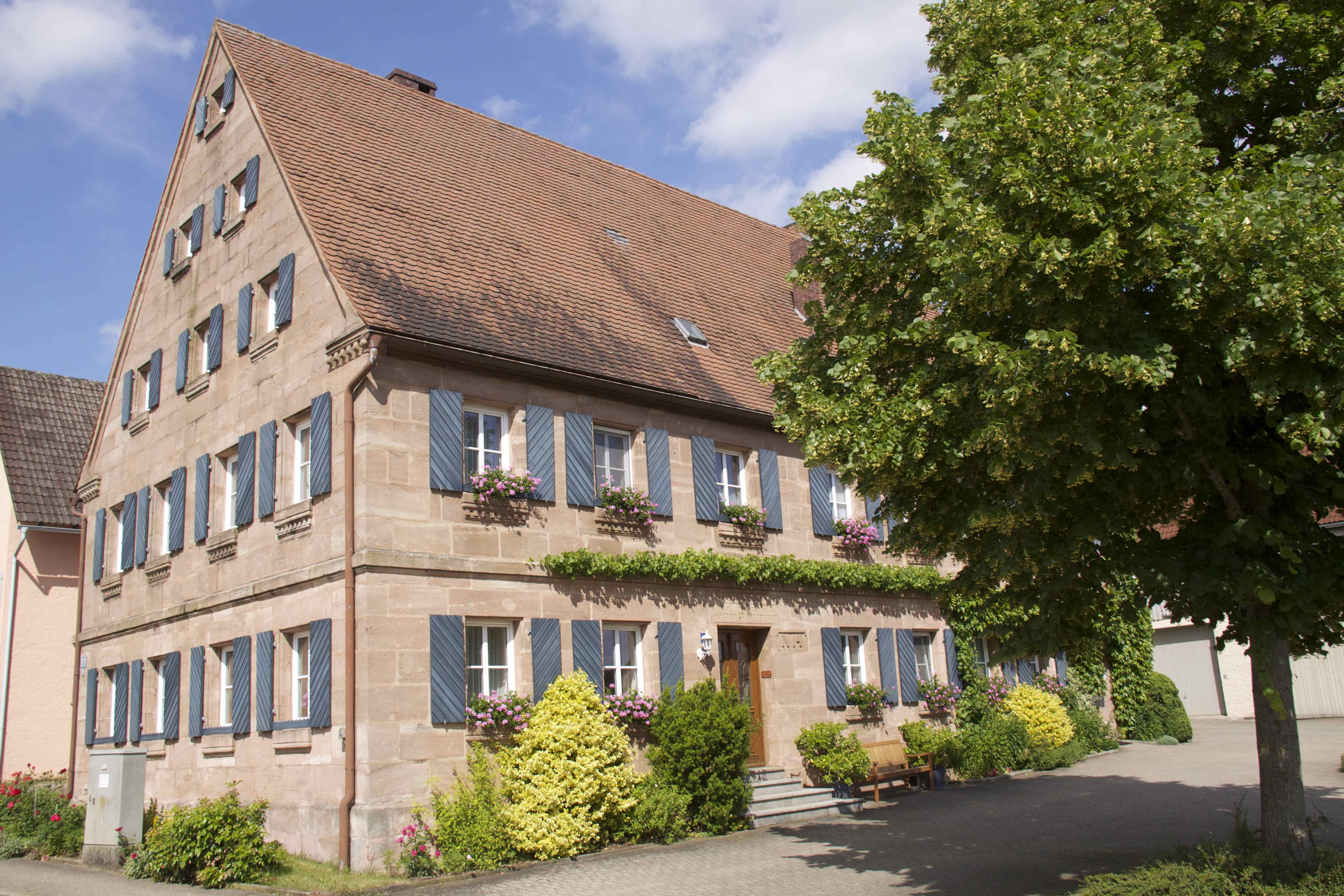 Igelsbach Bauernhaus (alt Nr. 14, neu Nr. 62)